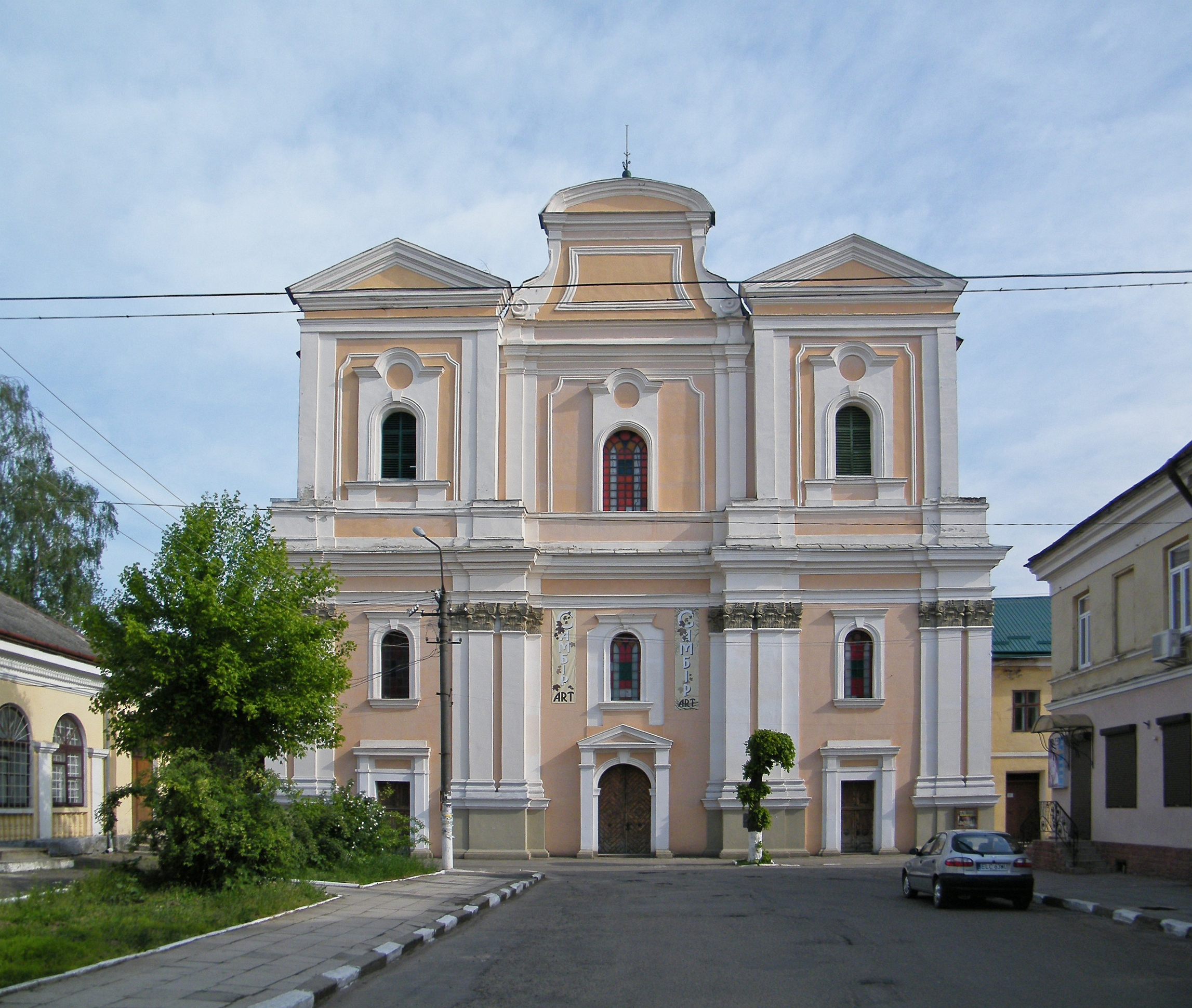 Органный зал в бывшем костеле Св. Станислава